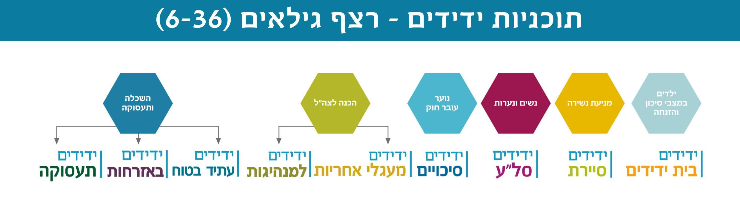 תכניות ידידים - רצף גילאים